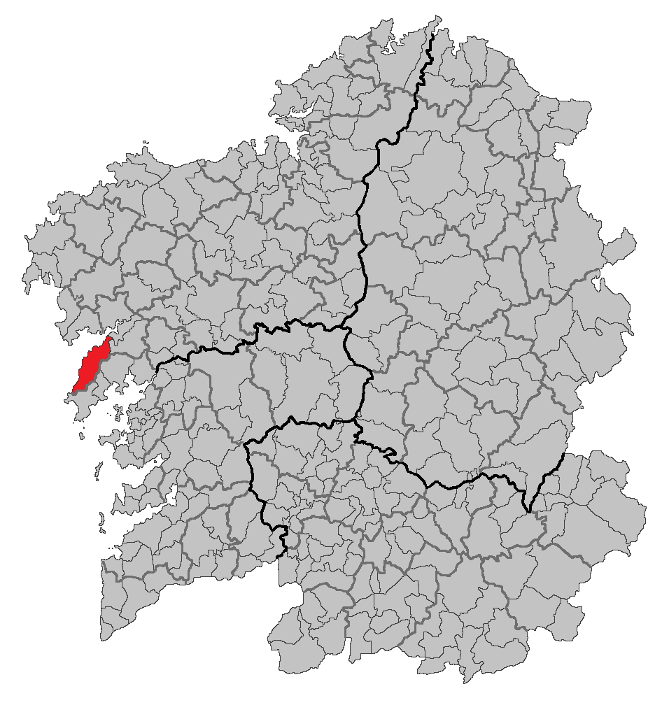 Mapa coa localización do concello de Porto do Son.